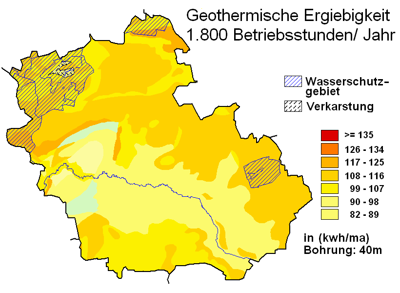 geothermische Karte Dörentrup